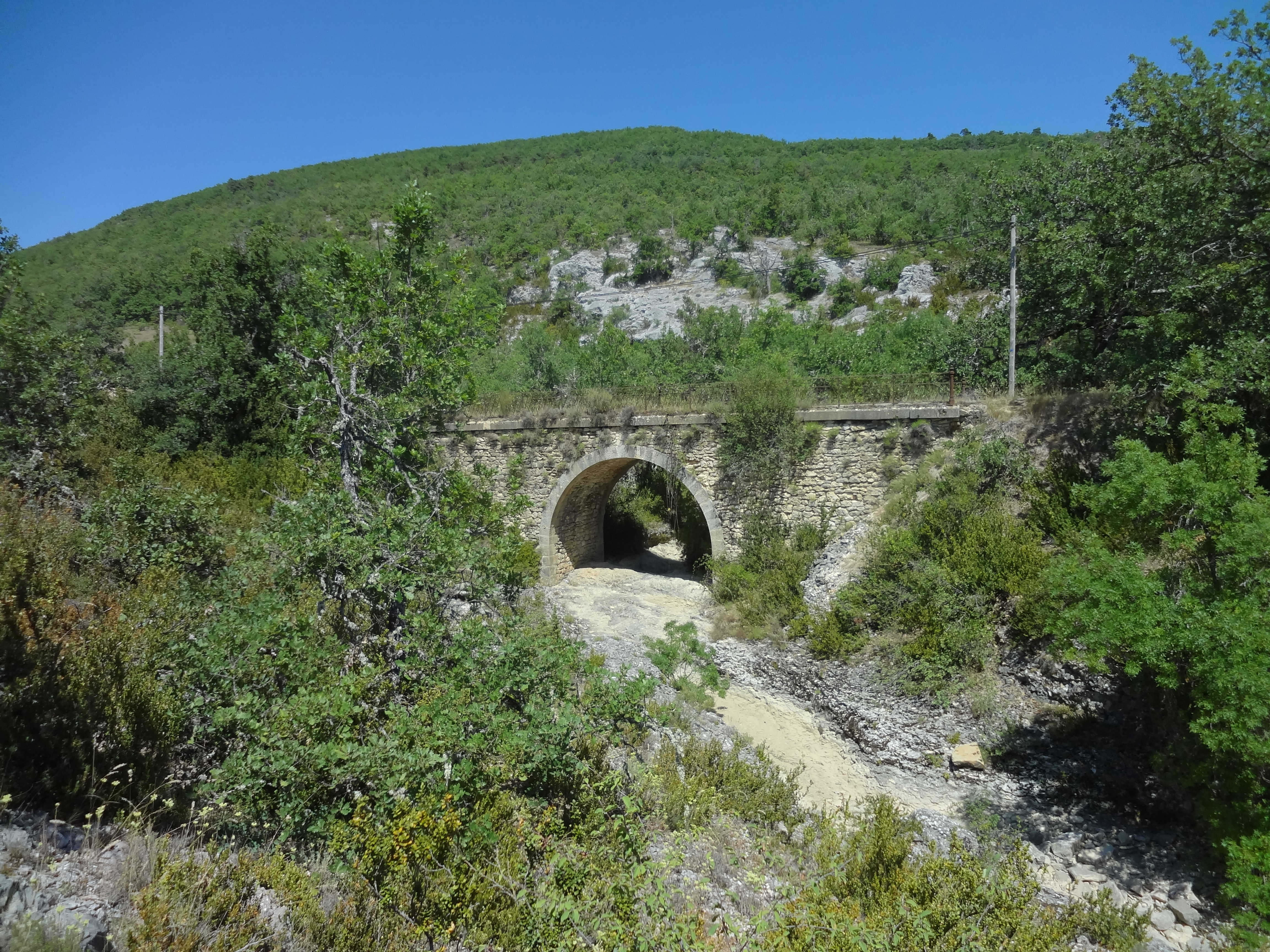 Pont sur le Largue, amont du hameau de Largue